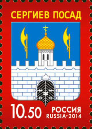 Герб города Сергиева Посада